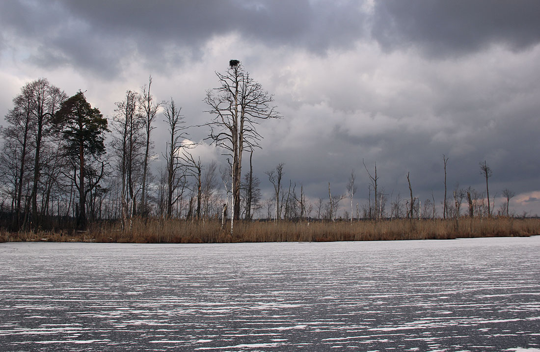 «Черемський», Маневицький район, Черемський природний заповідник